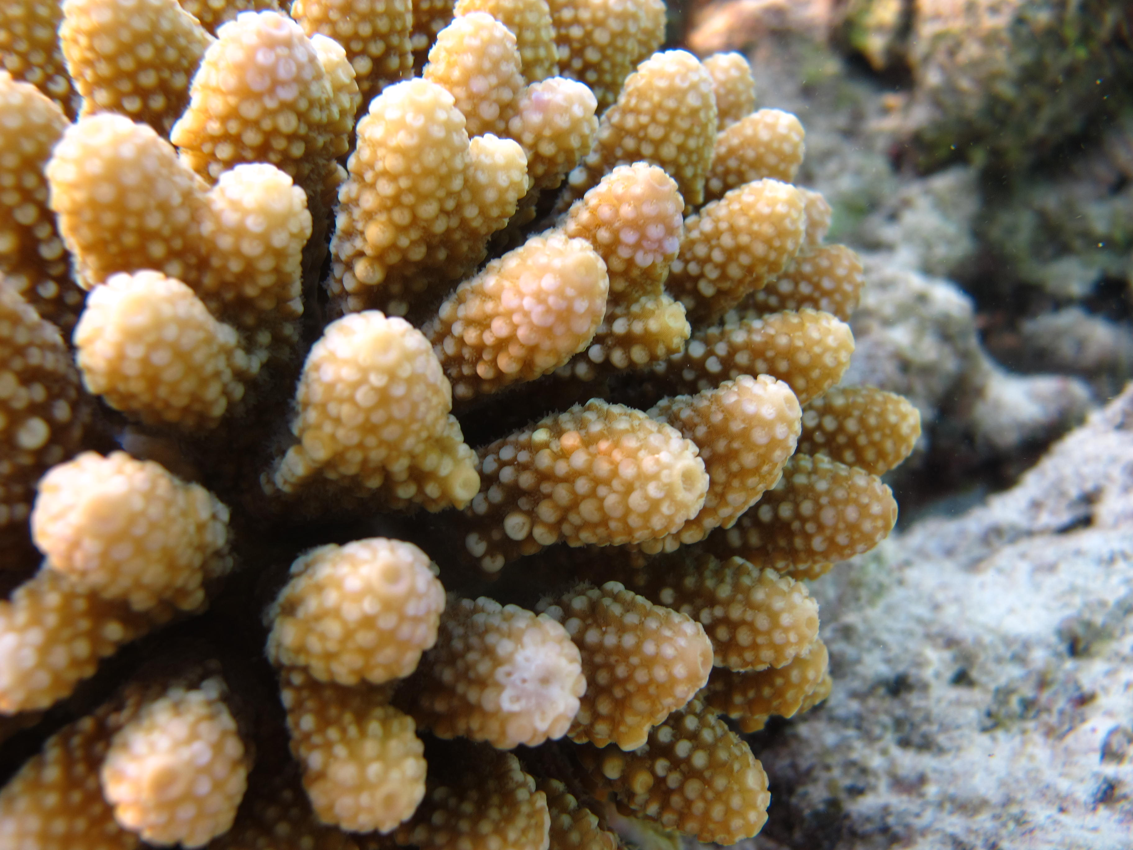 Gros plan sur du corail Acropora globiceps aux Maldives (atoll de Baa).